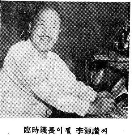 이원찬, 한국 초대 서울시의원(1956-1960), 서울시의회 임시의장(1956.09.01-09.06.)